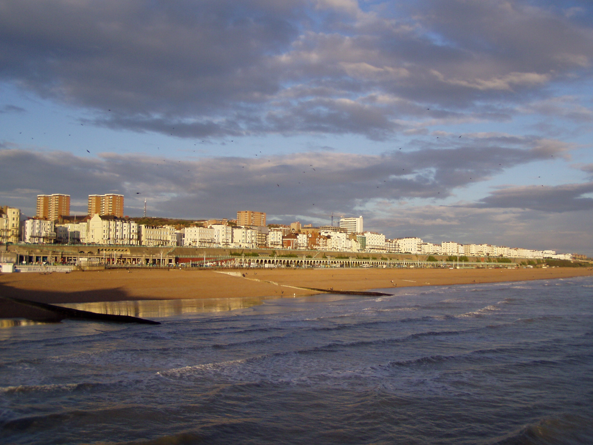 Brighton Seafront, fotographiert aus von der Brighton Pier (Palace Pier) in Richtung Osten (Marina)